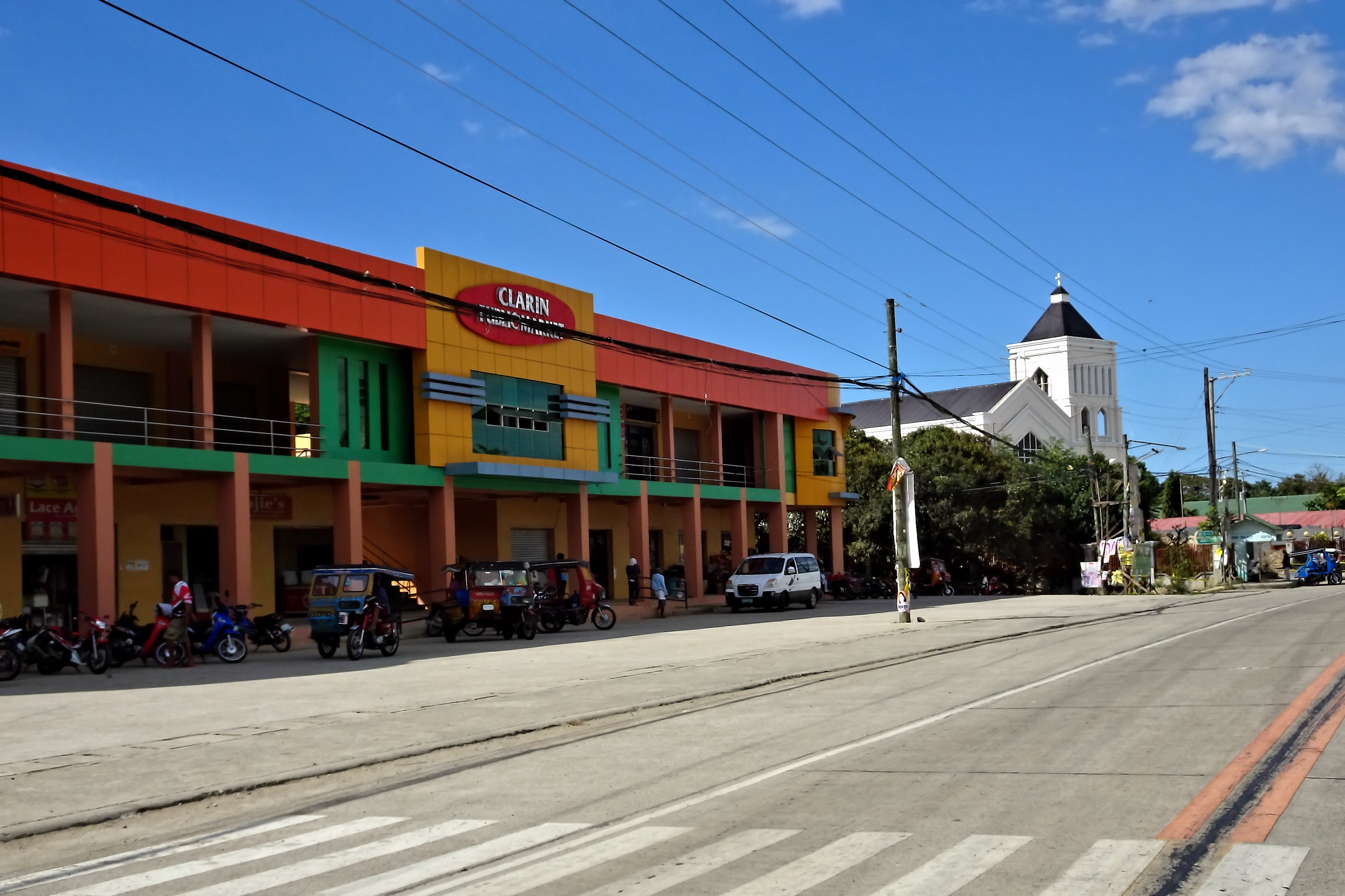 Clarin, Bohol, Philippines